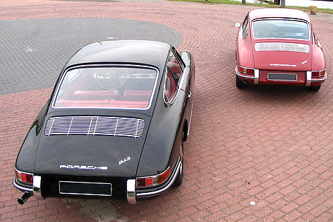 Twee vroege Porsche 912's, type 1966.